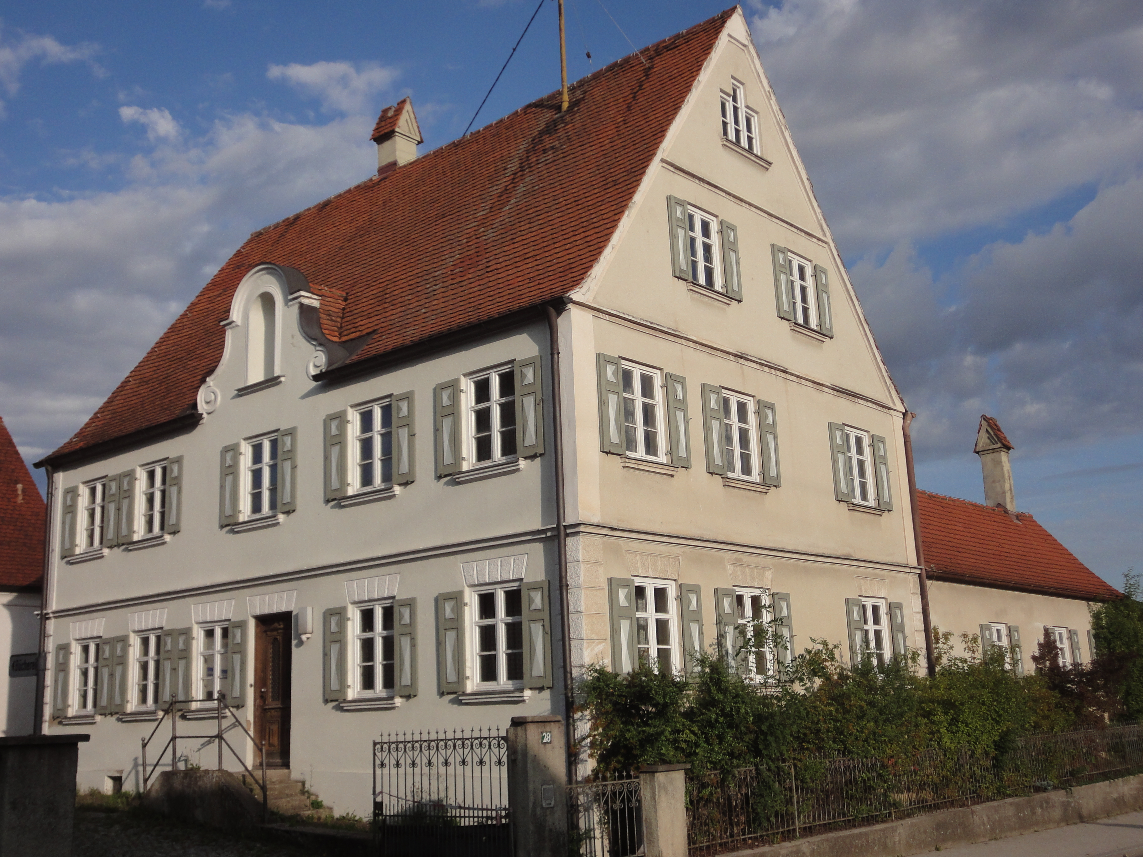 Pfarrhaus, zweigeschossiger Satteldachbau mit Voluten- Zwerchgiebel, von Jörg Wörle, 1680, Ende 19. Jahrhundert erneuert; ehem. Pfarrstadel, Satteldachbau mit Quertenne und Hackenschopf, 1779, innen verändert.